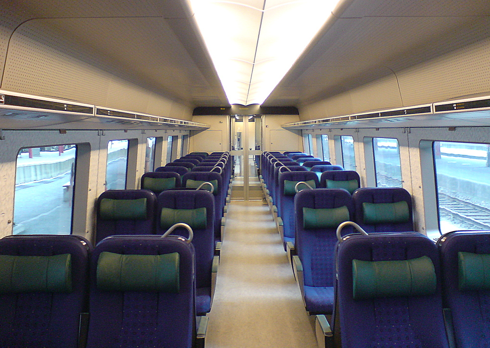 Interiör i en X31 på Göteborgs Central.